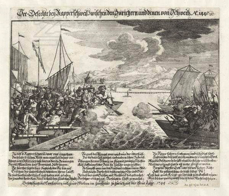 Belagerung von Rapperswil (SG) durch die Innerschweizer während des Alten Zürichkriegs.Beschreibung: See-Gefechte bey Rapperschwyl zwischen den Zürichern und denen von Schwytz. Anno 1445. [Bildunterschrift teilweise unleserlich] Dargestellt ist die Schwyzer 'Seeflotte' während des Alten Zürichkriegs gegen die Stadtzürcher 'Seeflotte', geografisch betrachtet in der Kempratnerbucht auf dem Zürichsee. Im Hintergrund ist schemenhaft die Stadtsilhouette zu erkennen, deutlich hingegen die Holzbrücke, links davon der Obersee.